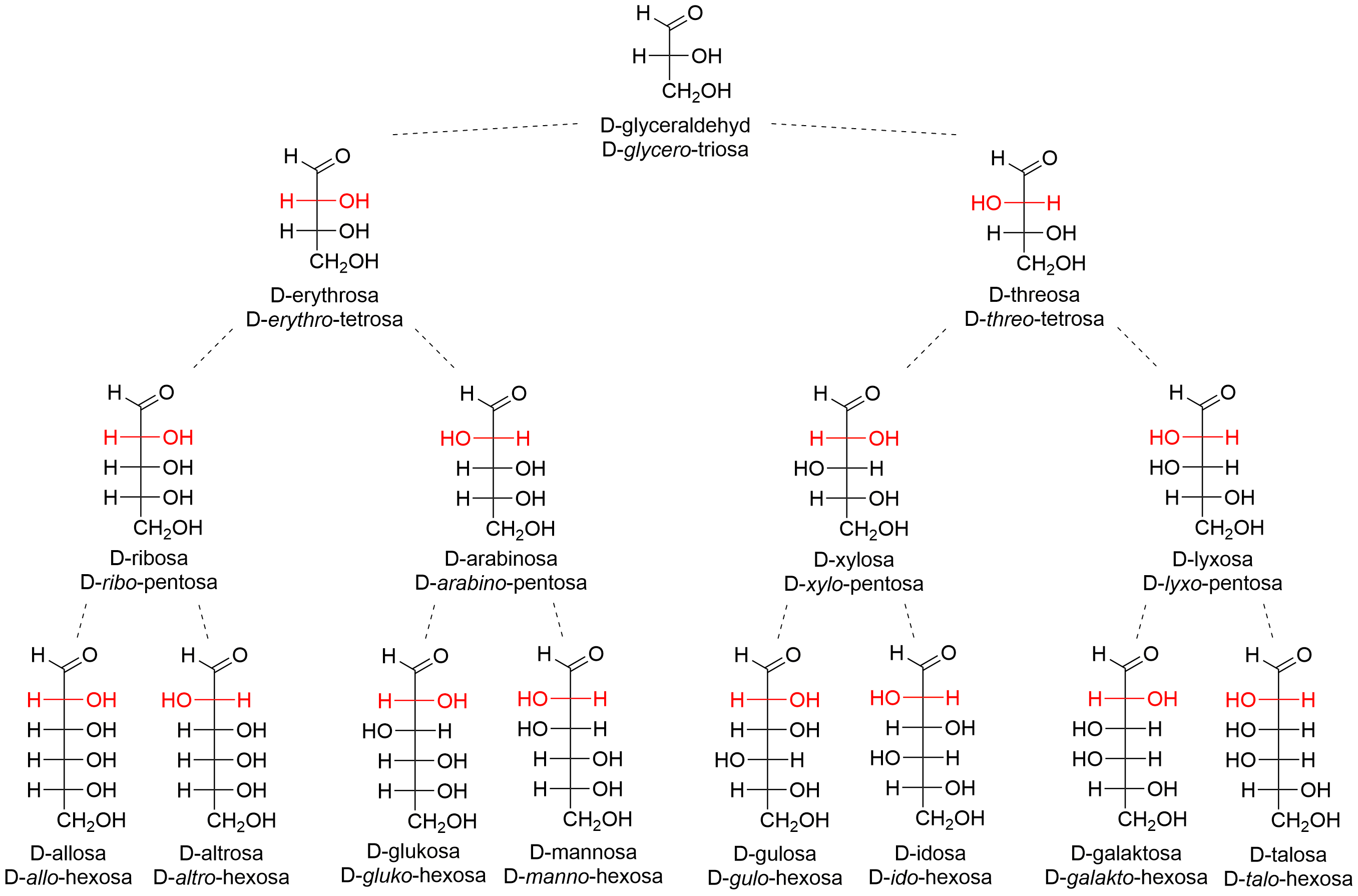 Aldohexosy a jejich odvození.